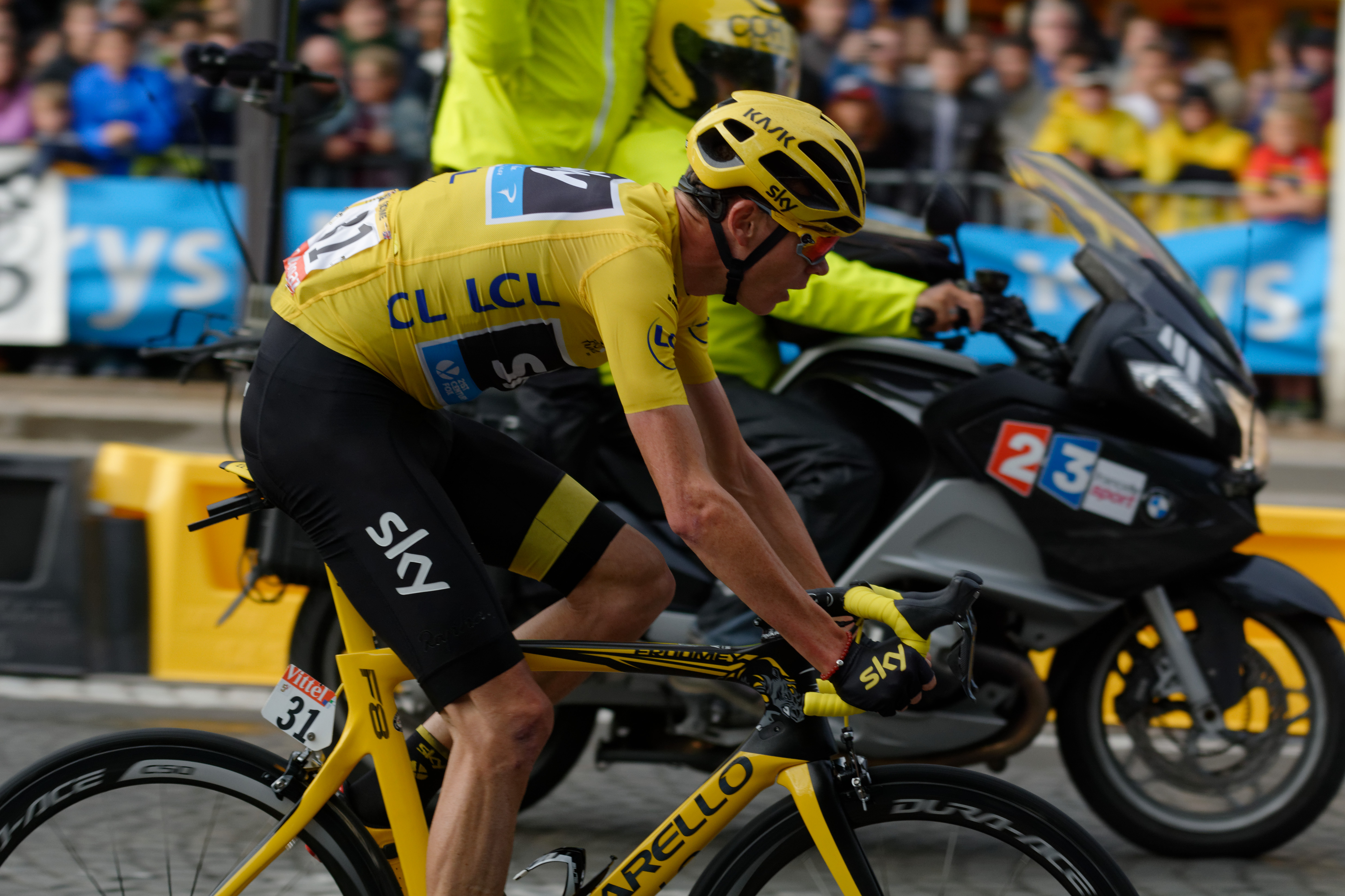 D71_3251_DxO